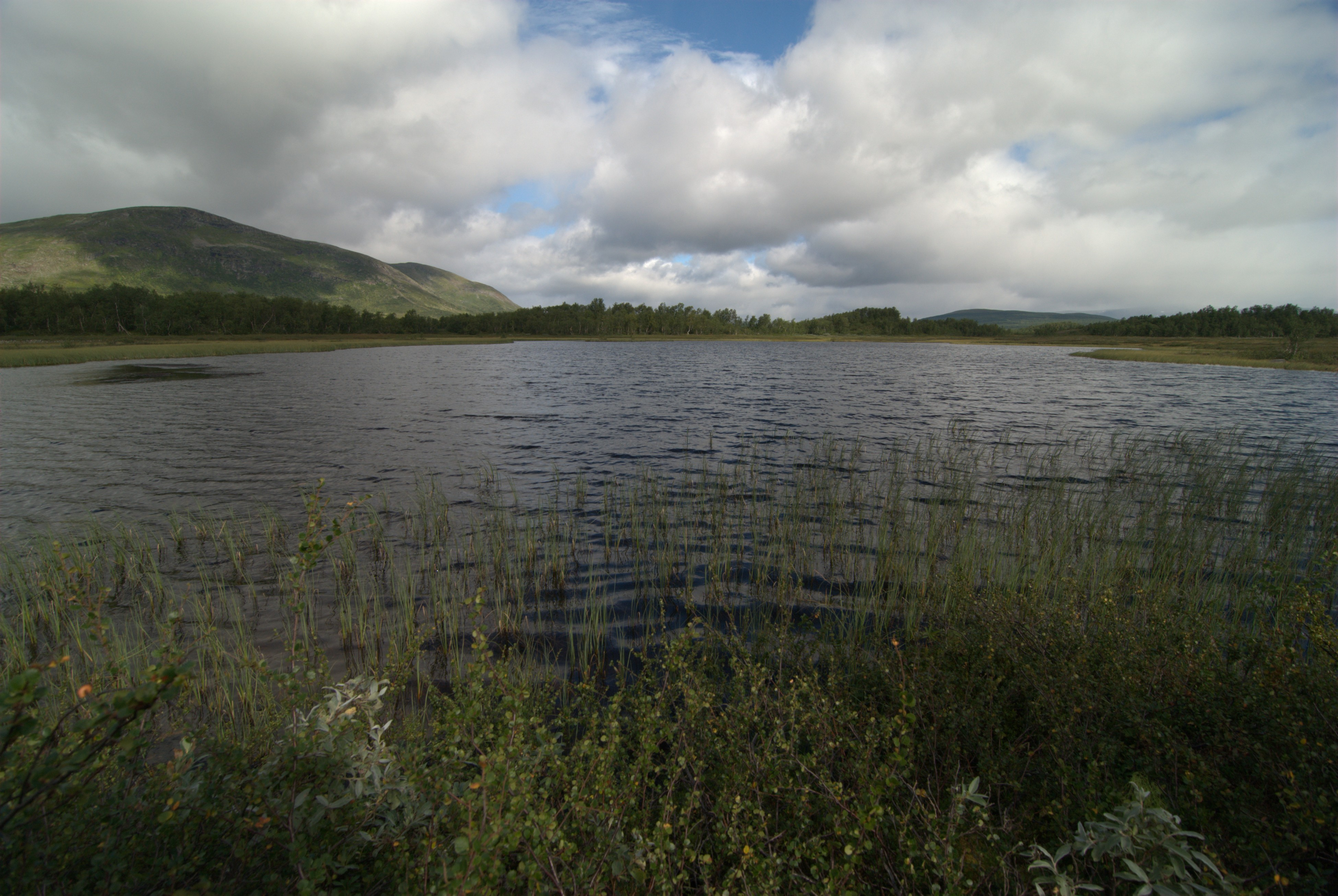 South of the Tärnasjön lake seen from Kungsleden trail, Vindelfjällen, Swedish Lapland